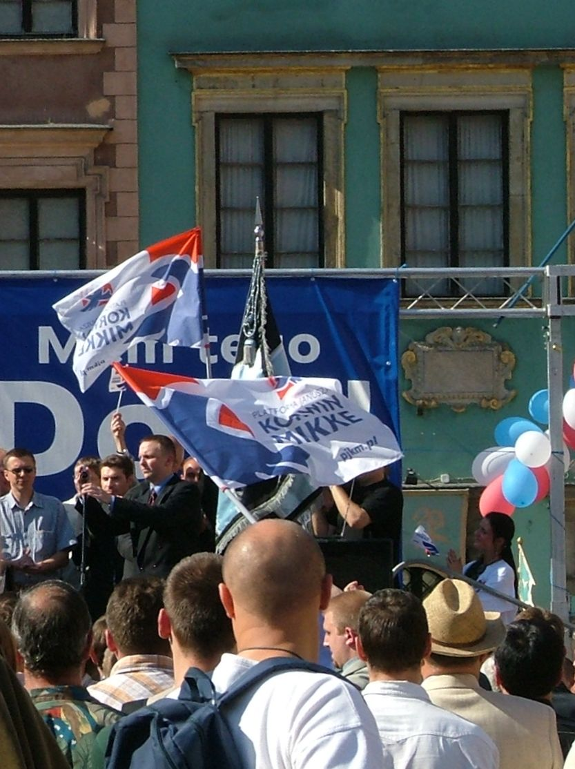 Platforma Janusza Korwin-Mikke, wybory 2005